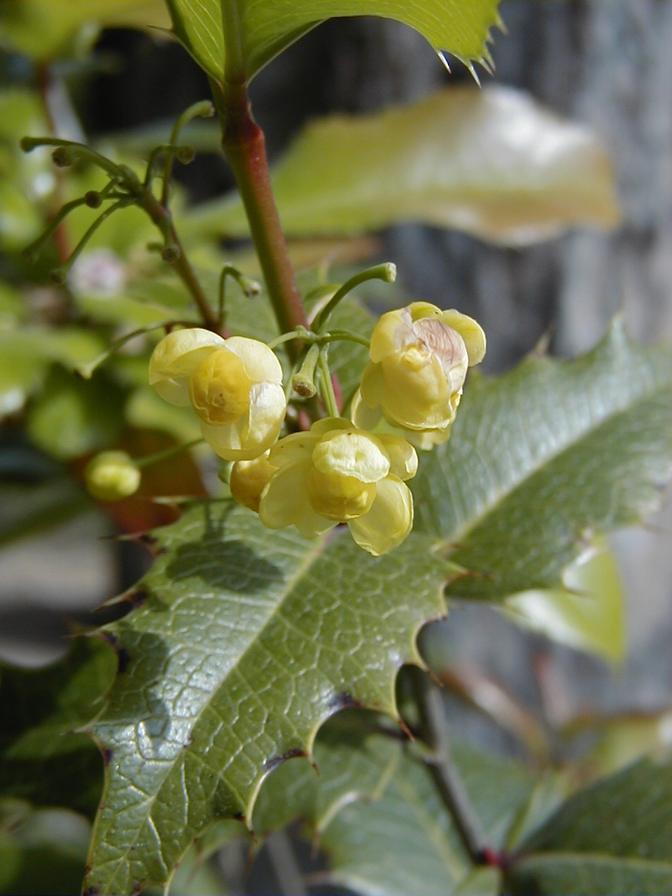 x Mahoberberis aquisargentii, Mahonia aquifolium x Berberis sargentiana. Real Jardín Botánico, Madrid